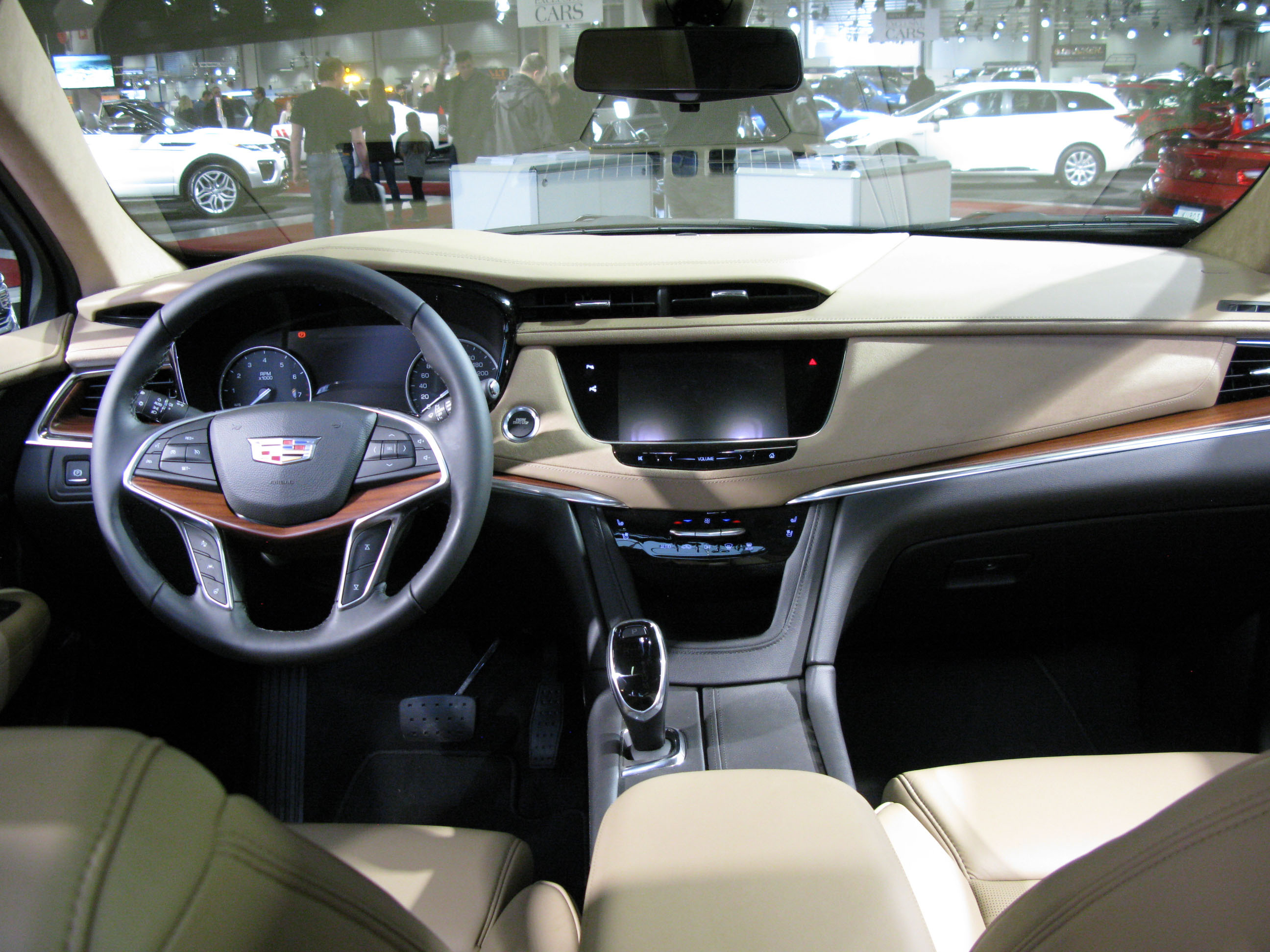 2017 Cadillac XT5